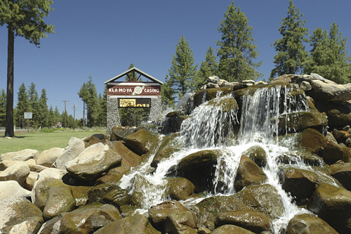 jn9854 Chiloquin OR Oregon Kla-Mo-Ya Casino entrance waterfall AJD51161 Chiloquin OR Oregon Kla-Mo-Ya Casino entrance